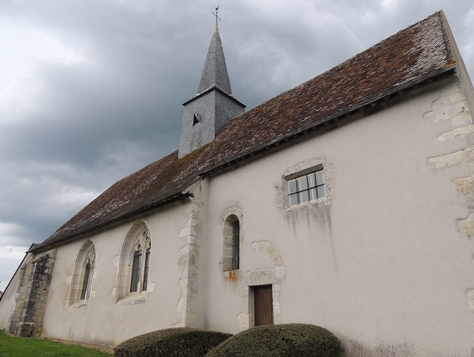 Église Saint-Pierre de Pray, facade Sud avec un aperçu du caquetoir à l'entrée à gauche de la photo, avec les 2 grandes baies gothiques percées au XVe s avec son clocher cours en ardoises, avec quelques petites ouvertures plus romanes et un tout petit aperçu du chevet plat en haut à droite